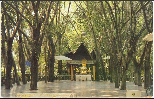 โบสถ์ธรรมชาติ สวยงามธรรมชาติ